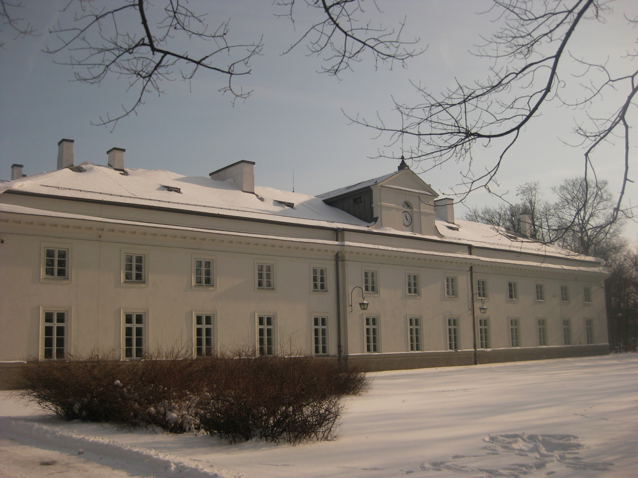 Warszawa, Wielka Oficyna (Szkoła Podchorążych), 1788